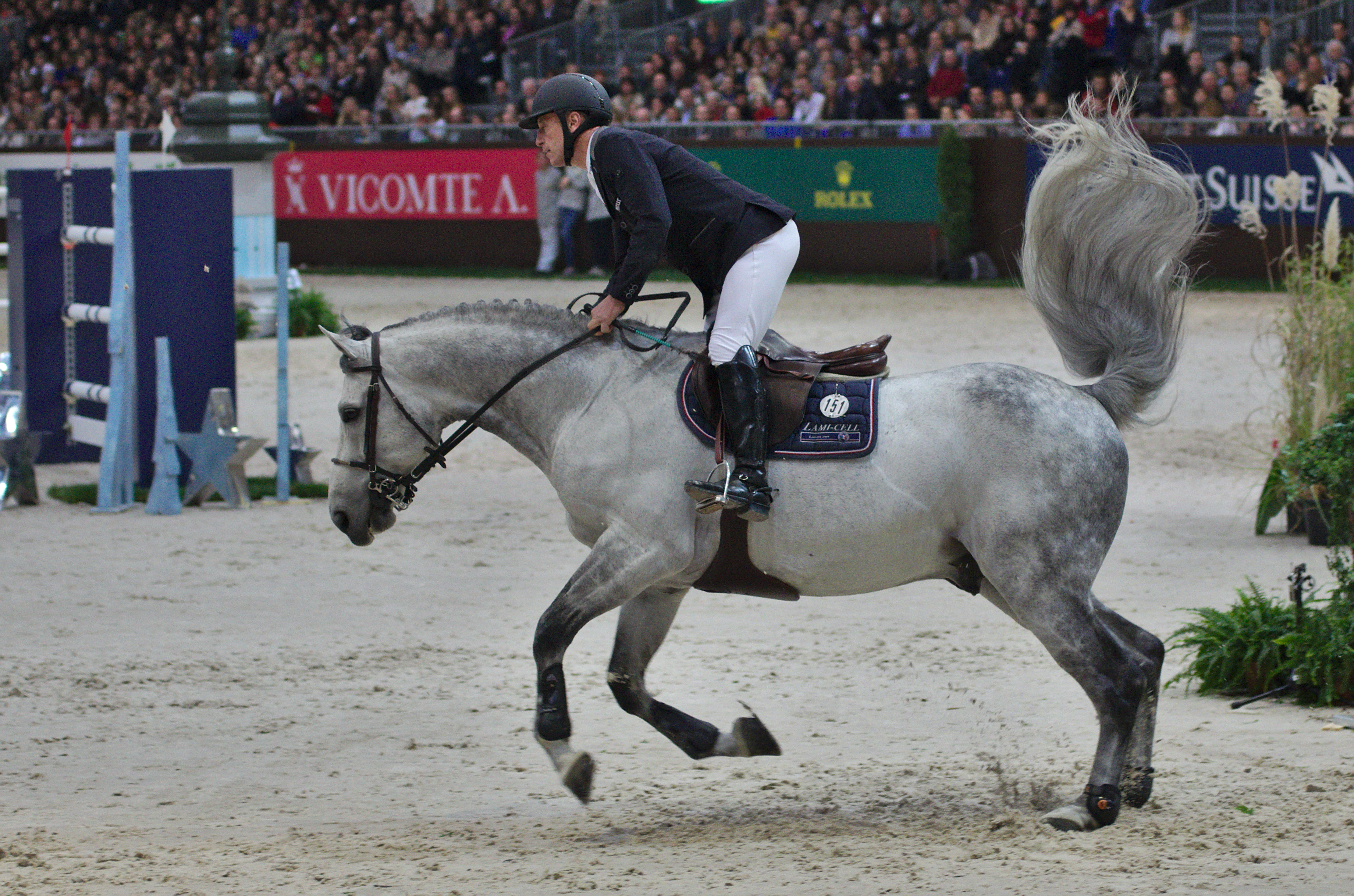 54eme CHI de Genève - 20141213 - Prix Credit Suisse - Roger Yves Bost et Pégase du Murier